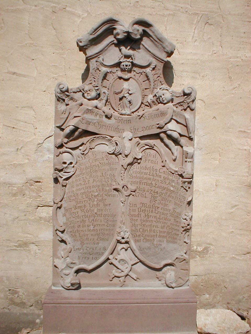 Amos-Epitaph aus dem 18. Jhd. an der Martinskirche in Brackenheim-Meimsheim